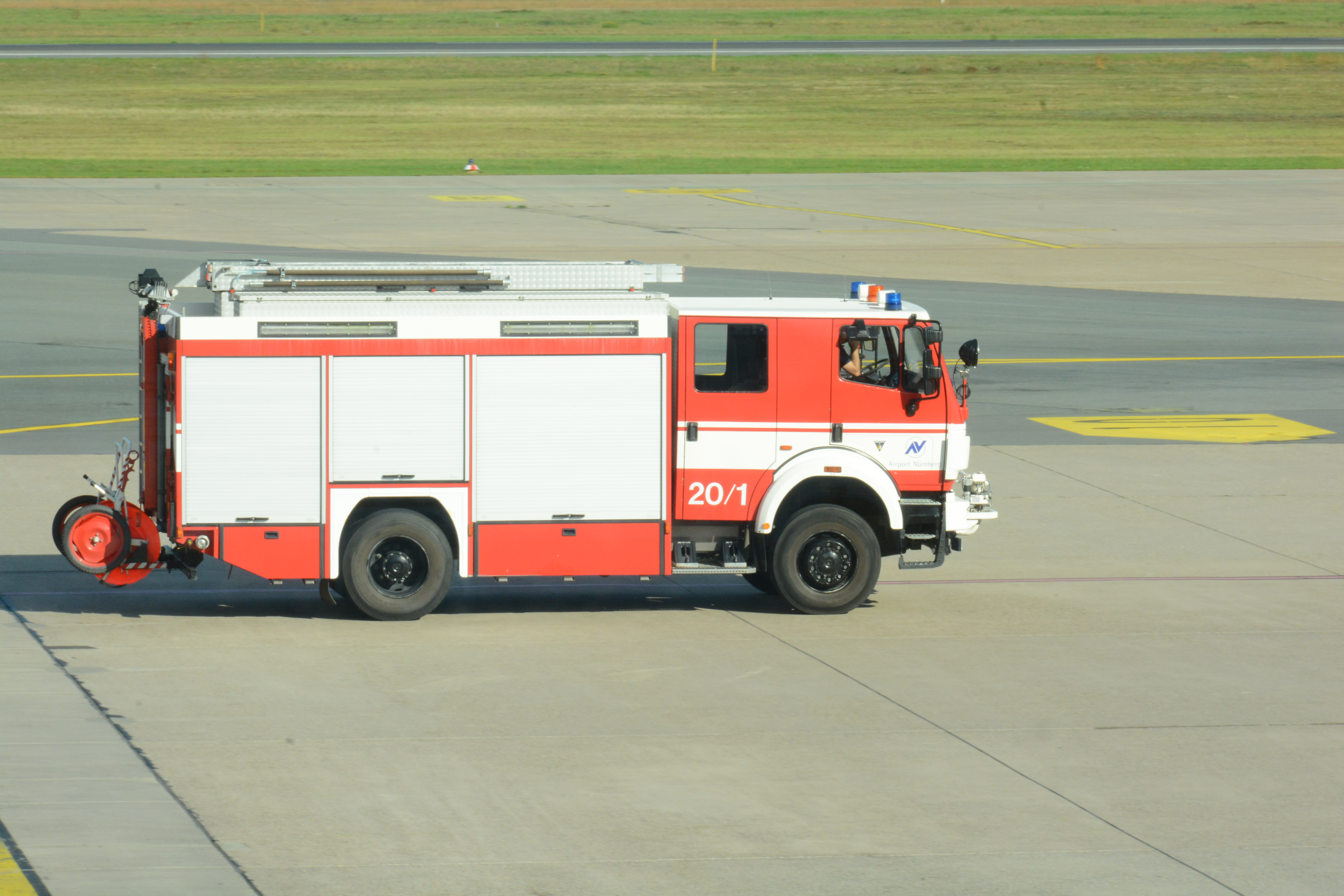 Feuerwehrfahrzeug auf dem Flughafen Nürnberg